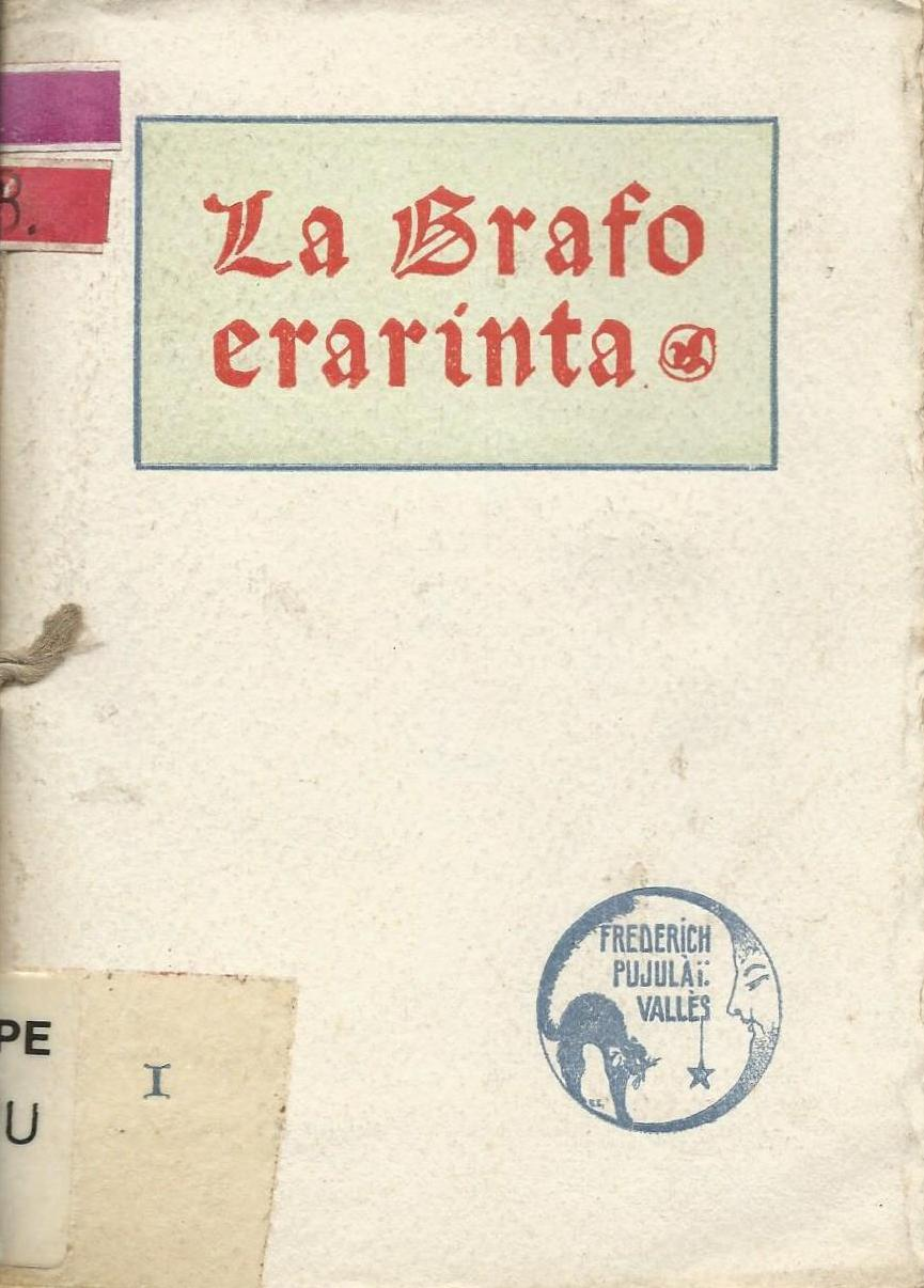 librokovrilo de "La Grafo Erarinta", 1903